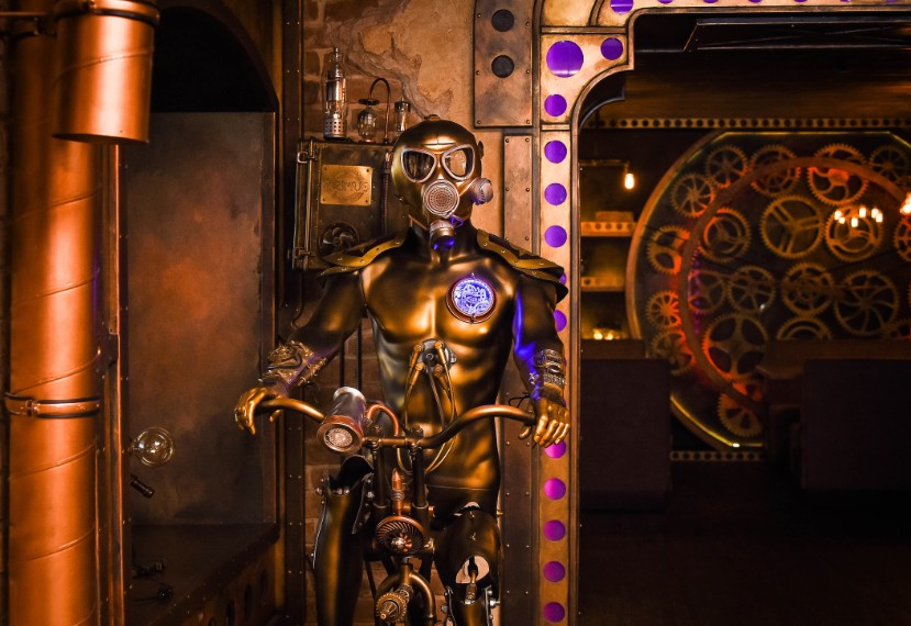 Стимпанк